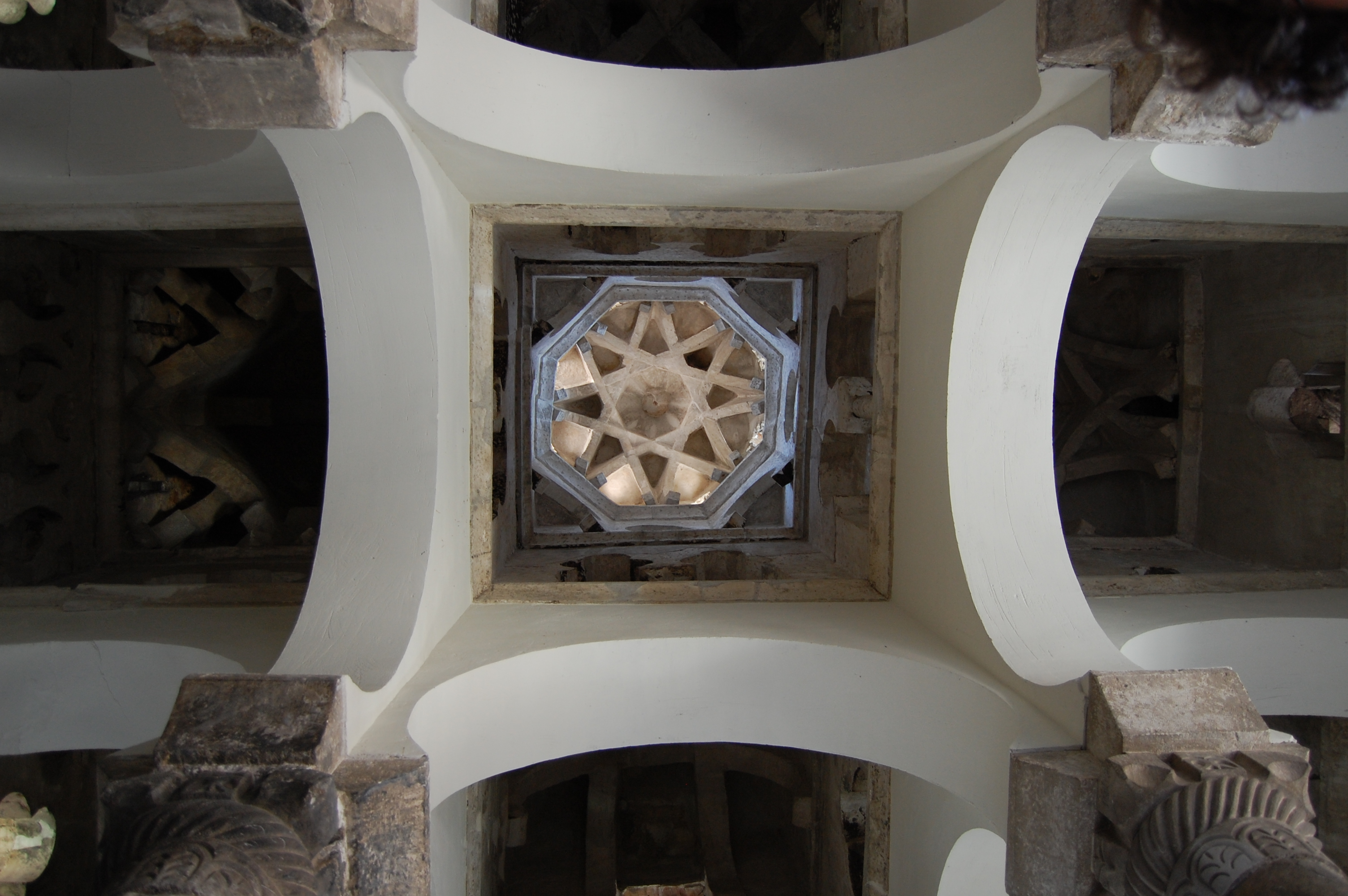 Antigua mezquita de Bab al Mardum. Iglesia del Cristo de la Luz, Toledo (España). Arte omeya de al-Andalus, año 999.